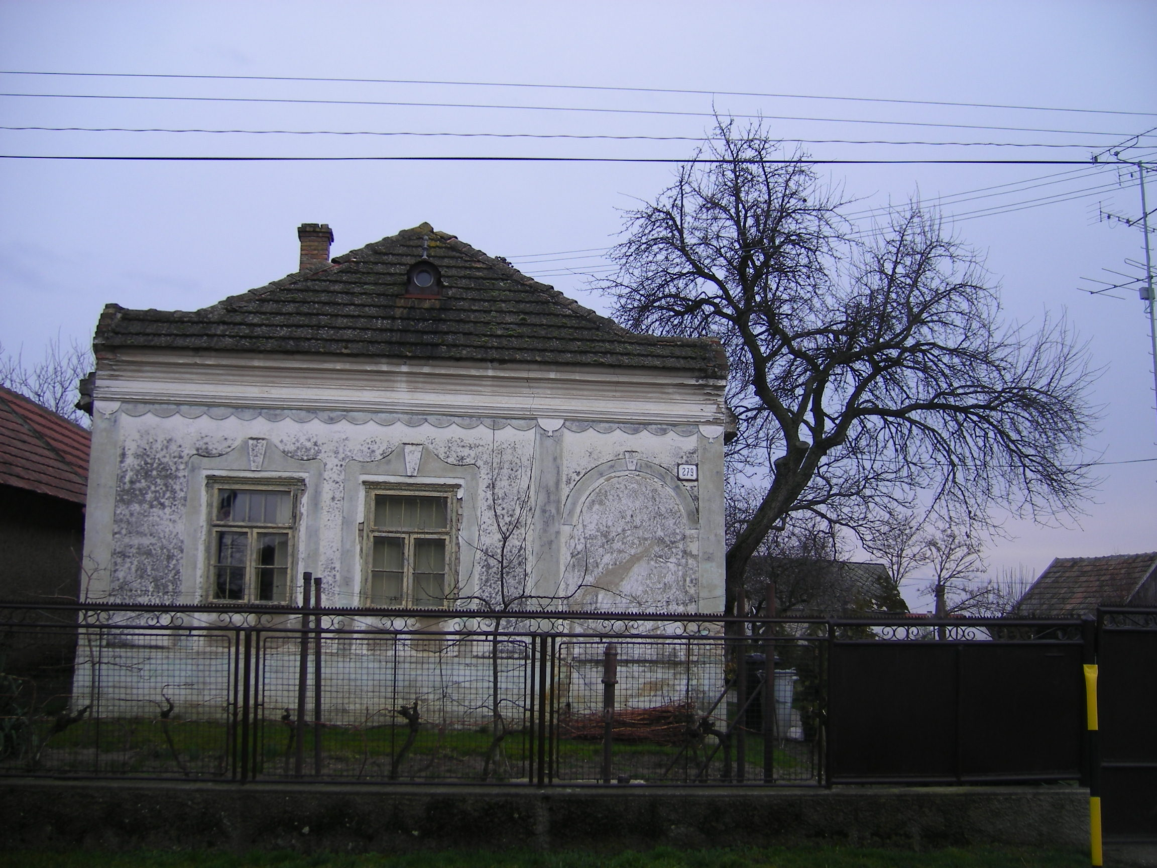 Martos, régi lakóház